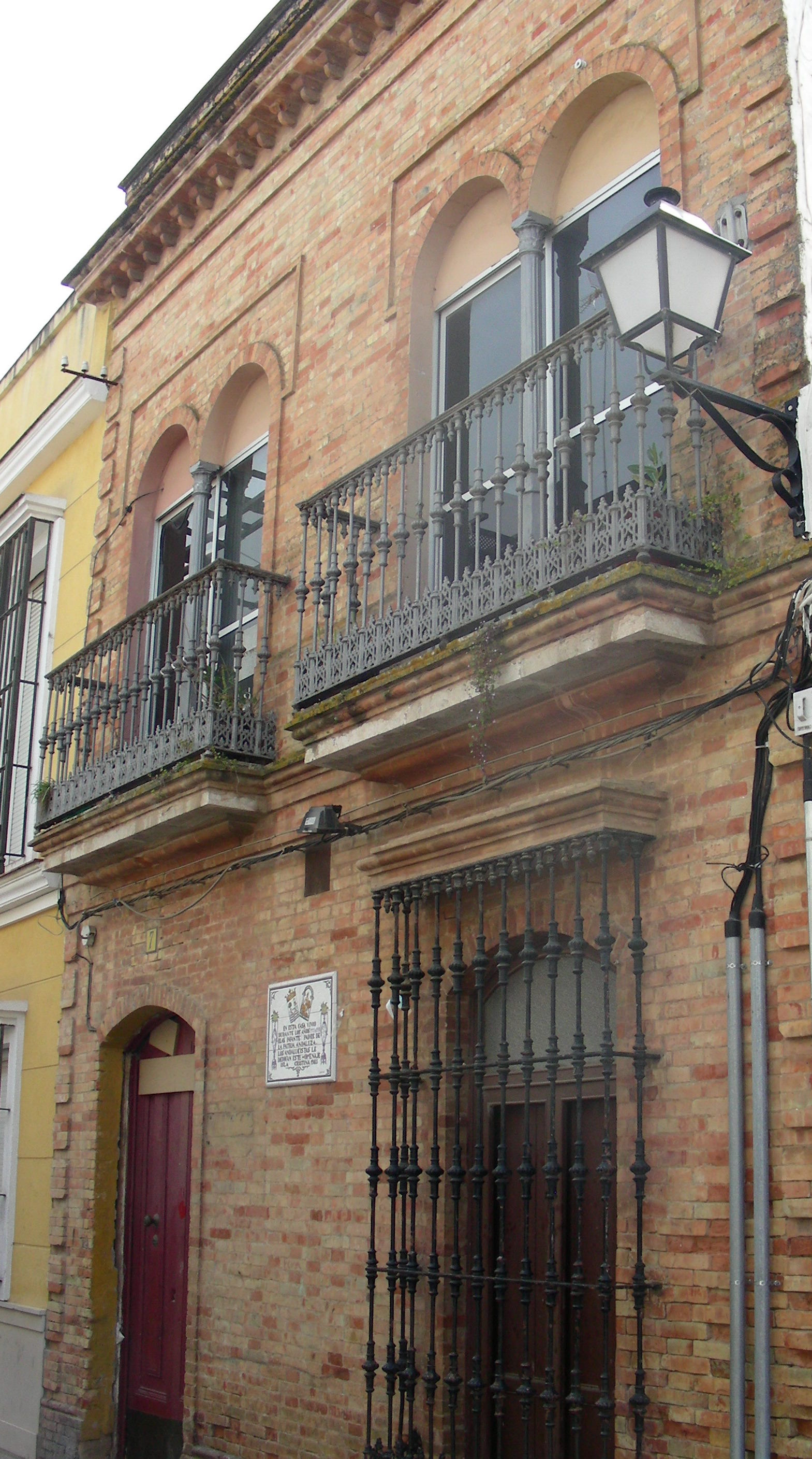 Casa de Blas Infante en Isla Cristina